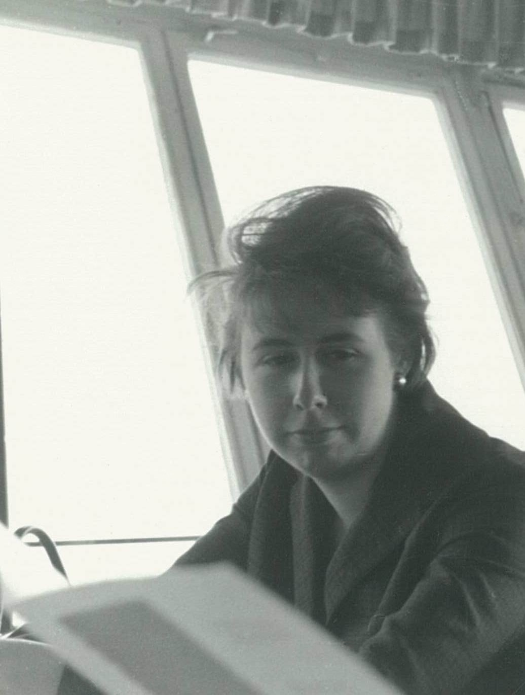 Marie Luise Gansberg als 27-Jährige auf dem Funkturm Berlin-Charlottenburg, Aufnahmedatum 1960, Foto: Eva D. Becker